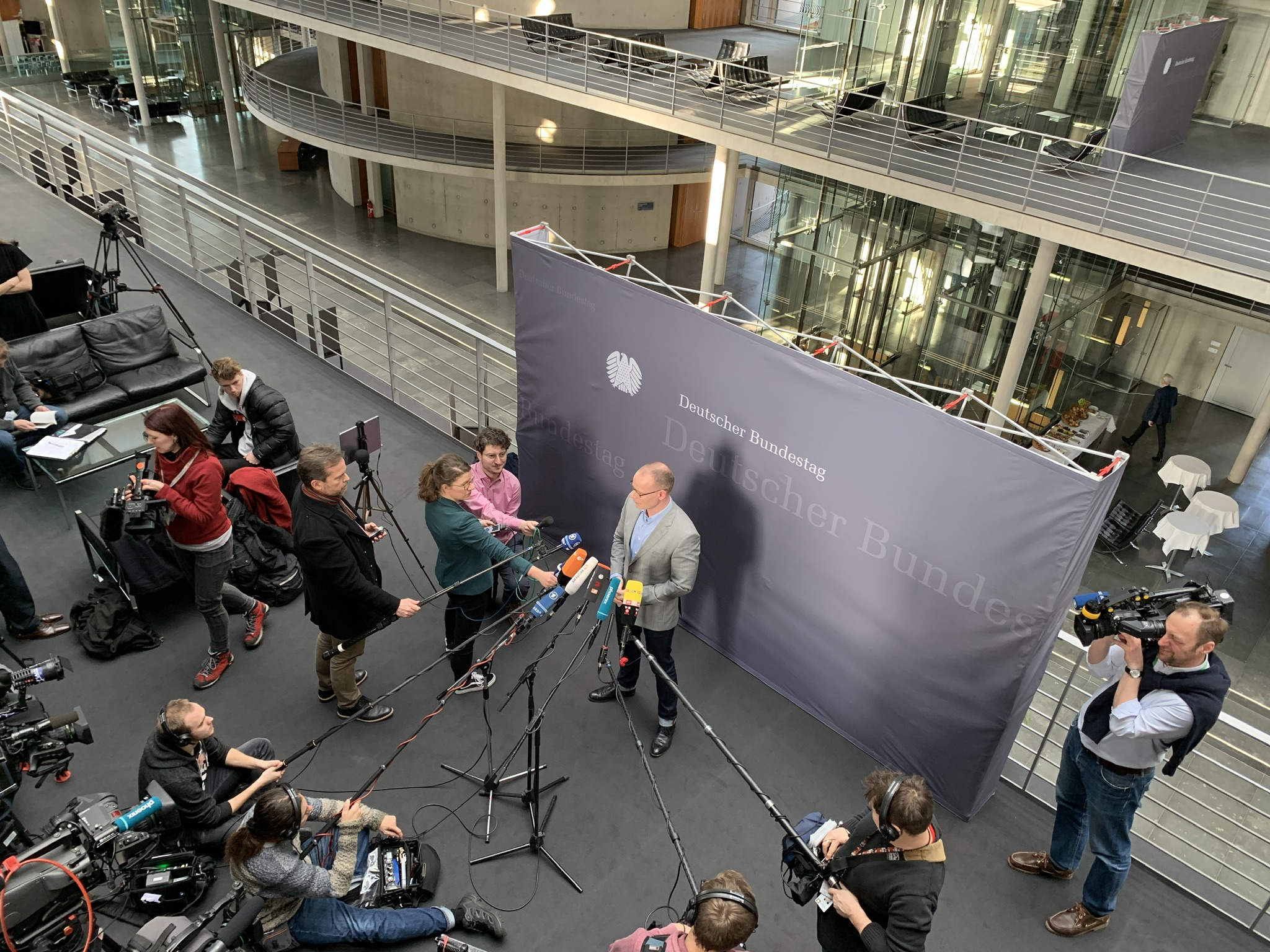 Statements Eröffnungssitzung des Berateraffäre-Untersuchungsausschuss // CC-BY Kenny S. Dettmers